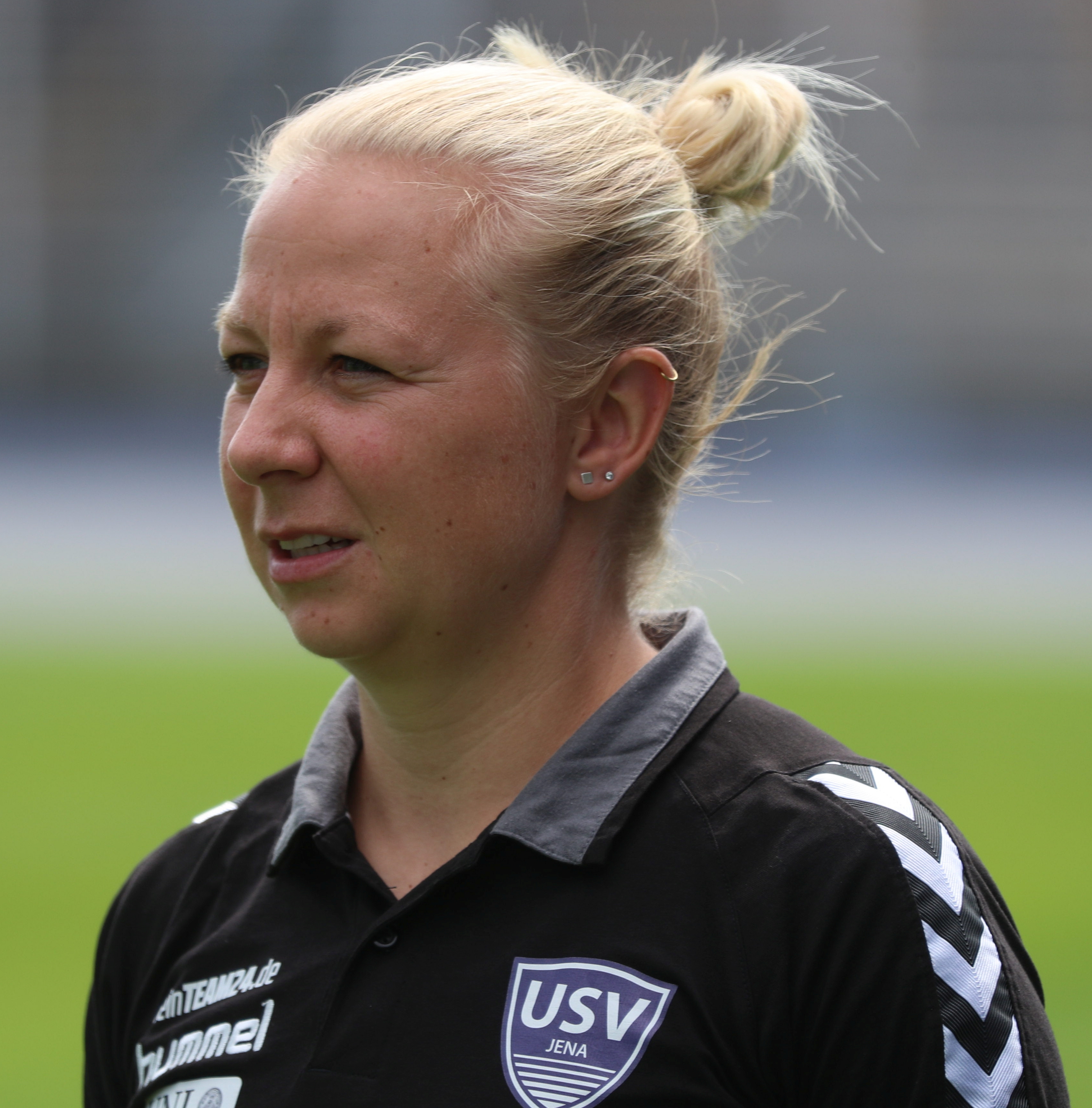 Allianz-Frauen-Bundesliga: FF USV Jena gegen SC Freiburg